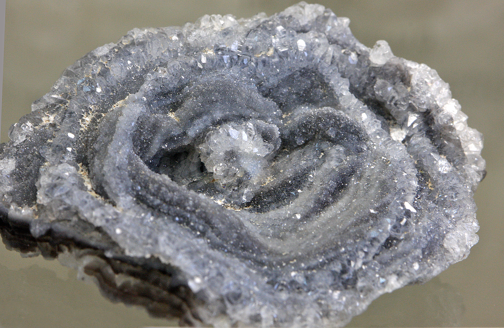 Brotryogen, Knoxville, CA/USA. Mineralogisches Museum Bonn